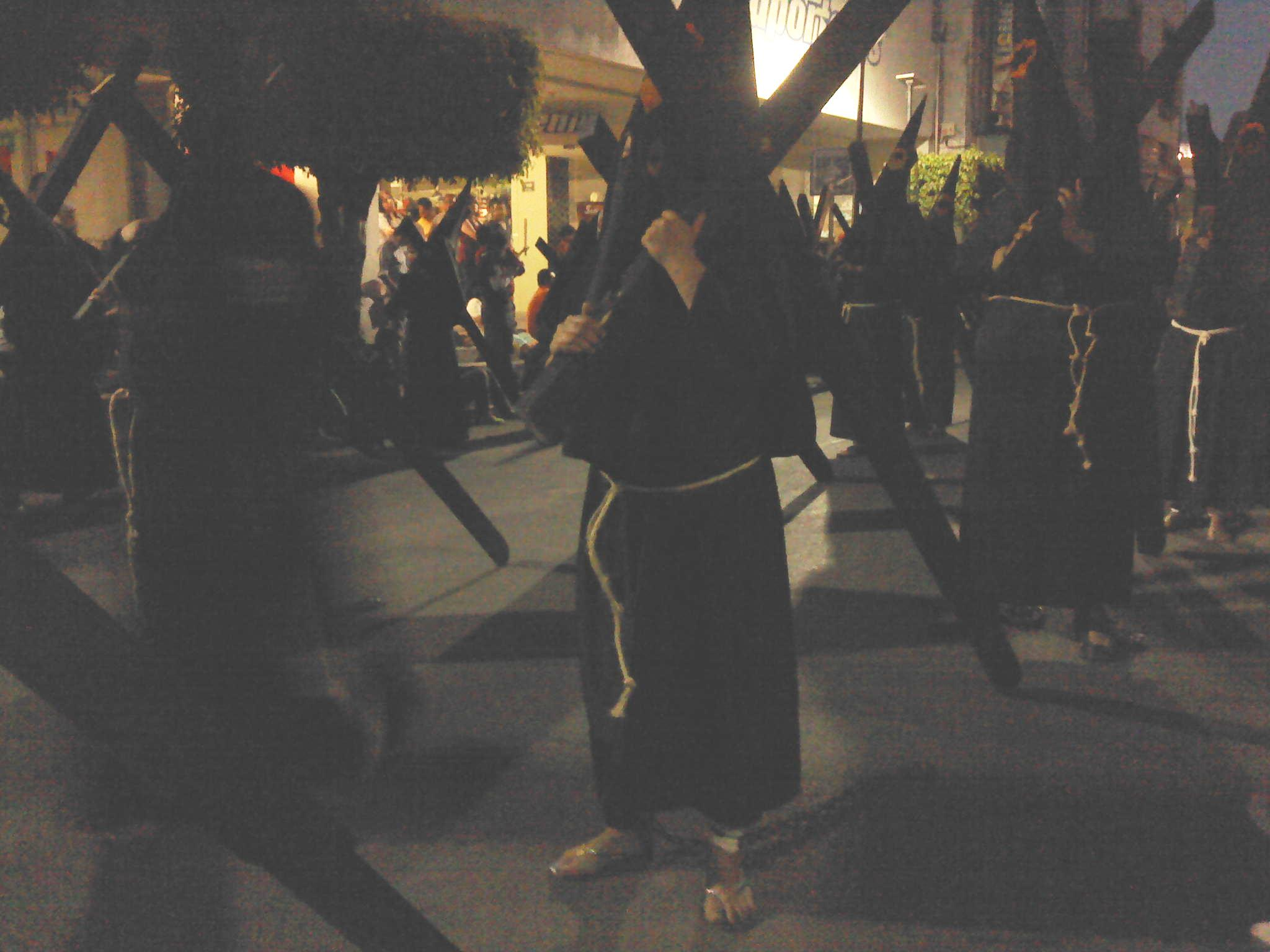 Penitentes Procesión del Silencio Celaya, Guanajuato, México